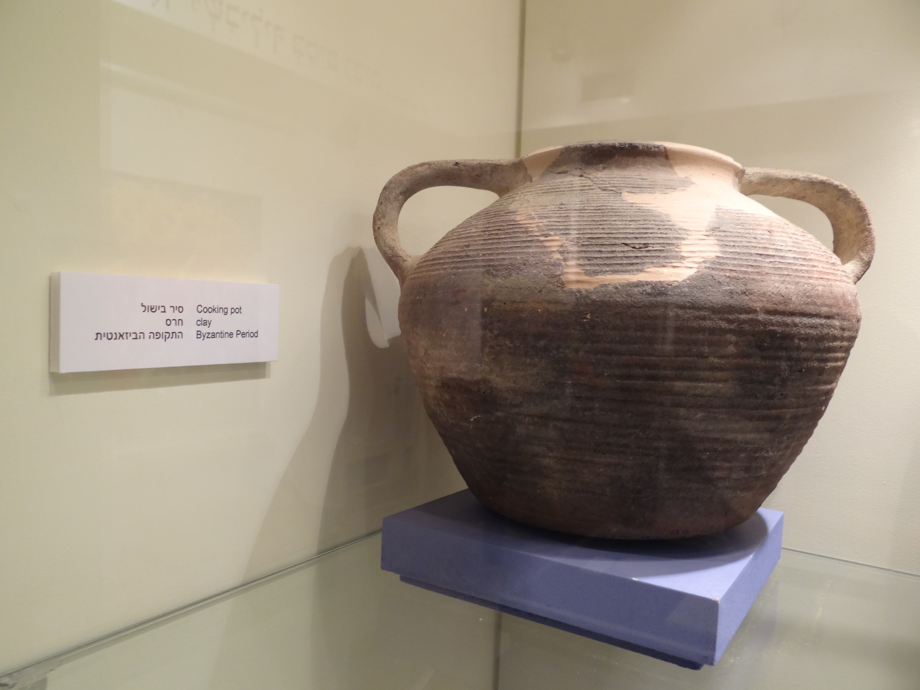 Archaeological Museum Beit Miriam in kibutz Palmahim, Israel מוזיאון בית מרים - הים ומלואו" הוא מוזיאון לארכאולוגיה השוכן בקיבוץ פלמחים מעל מצוק הצופה לים. המוזיאון מתרכז בממצאים ארכאולוגים שנחפרו באזור הקרוב לפלמחים, בחלקו התחתון של ערוץ נחל שורק וממצאים שנמשו מהים בקרבת הקיבוץ. סיר בישול מהתקופה הביזאנטית